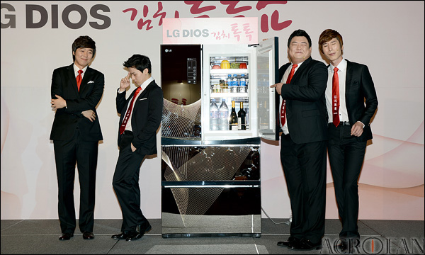 2012년 9월 21일, 서울 플라자 호텔에서 개최된 LG DIOS 김치톡톡쇼